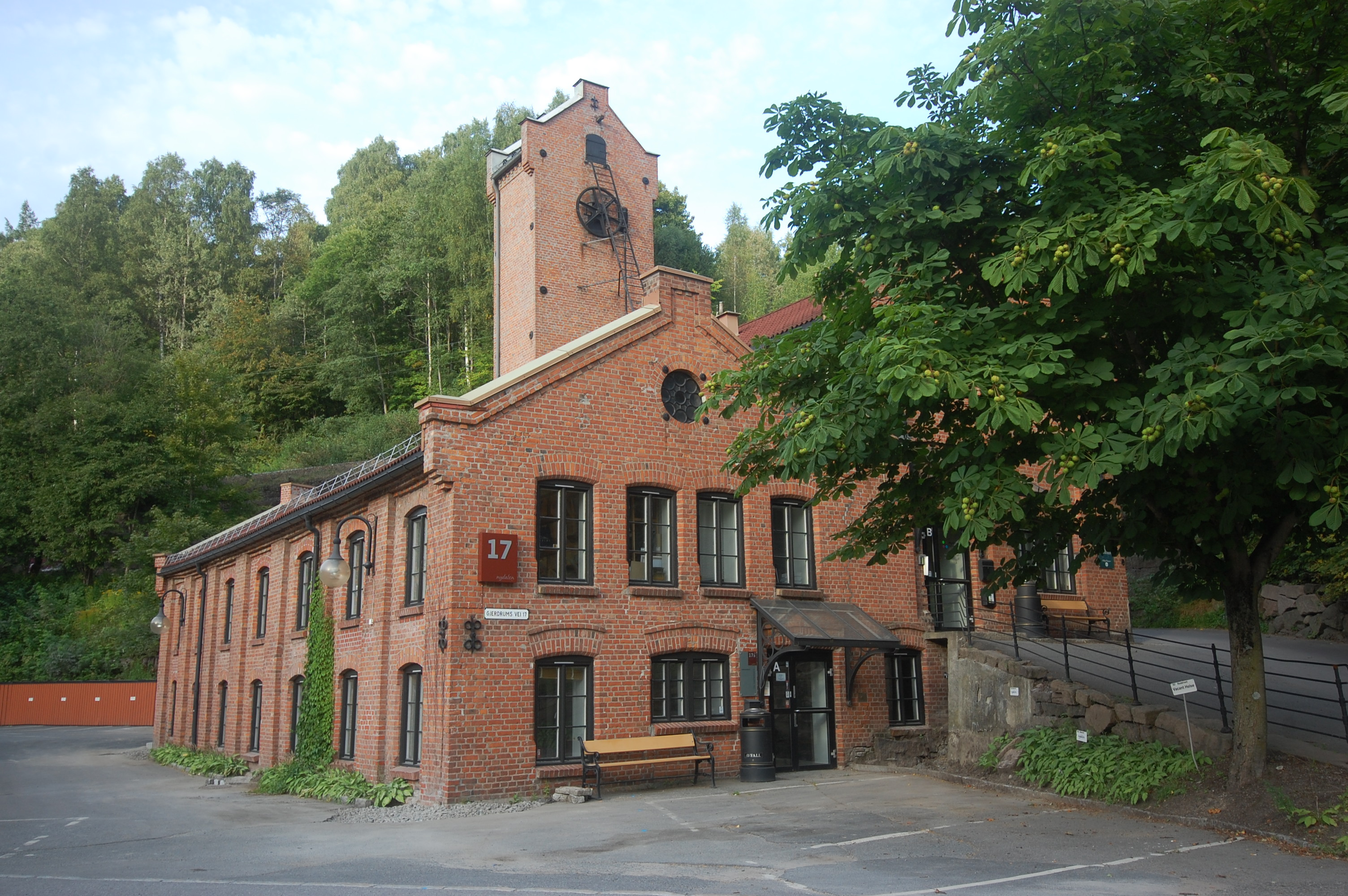 Det tidligere industriselskapet Nydalens Compagnie i Gjerdrums vei, Oslo.